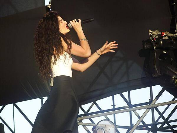 Imágenes tomadas por mi en el Lollapalooza Argentina